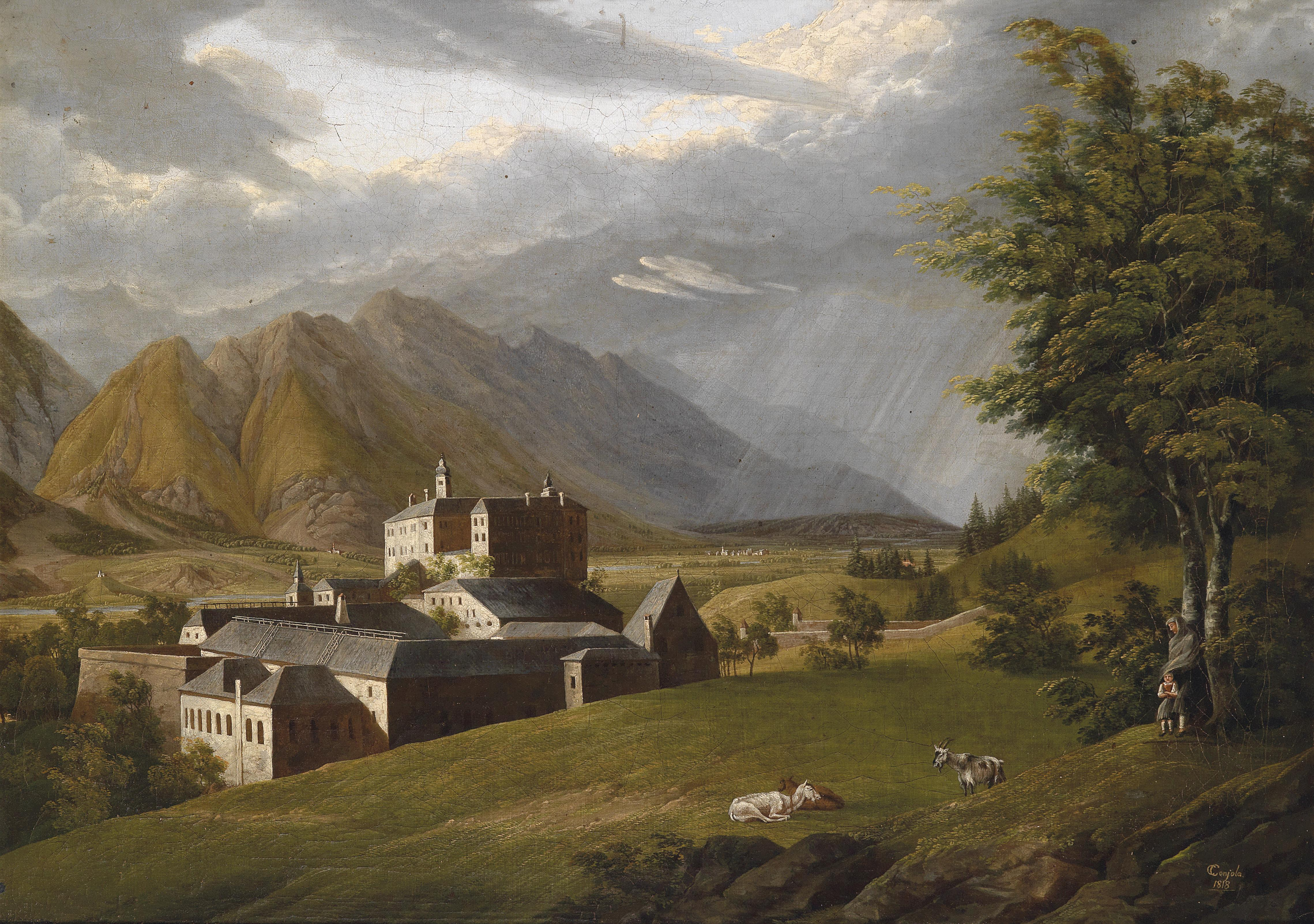 Blick auf Schloss Ambras, signiert, datiert C. Conjola 1818, Öl auf Leinwand, 58 x 80 cm